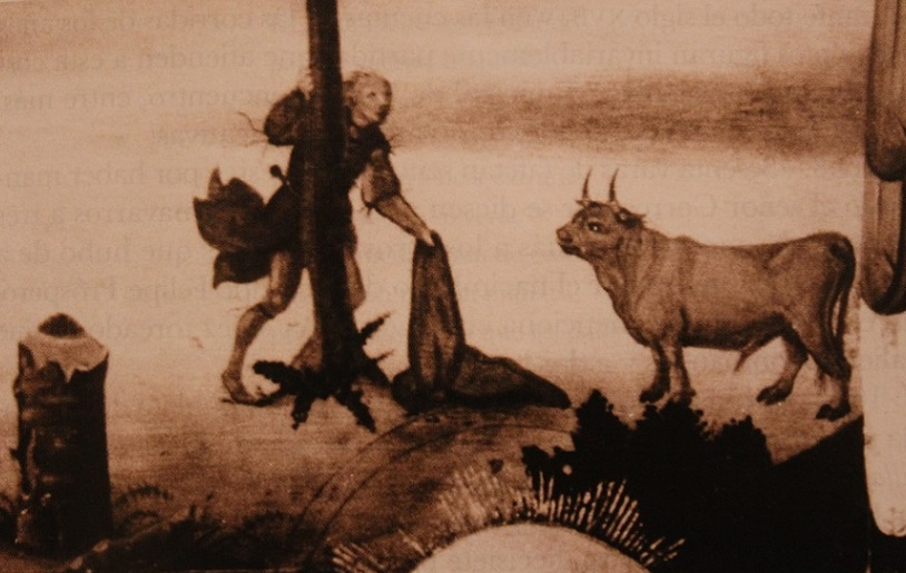 Detalle de la tabla de El milagro de San Dionisio que muestra a un paje citando a un toro.